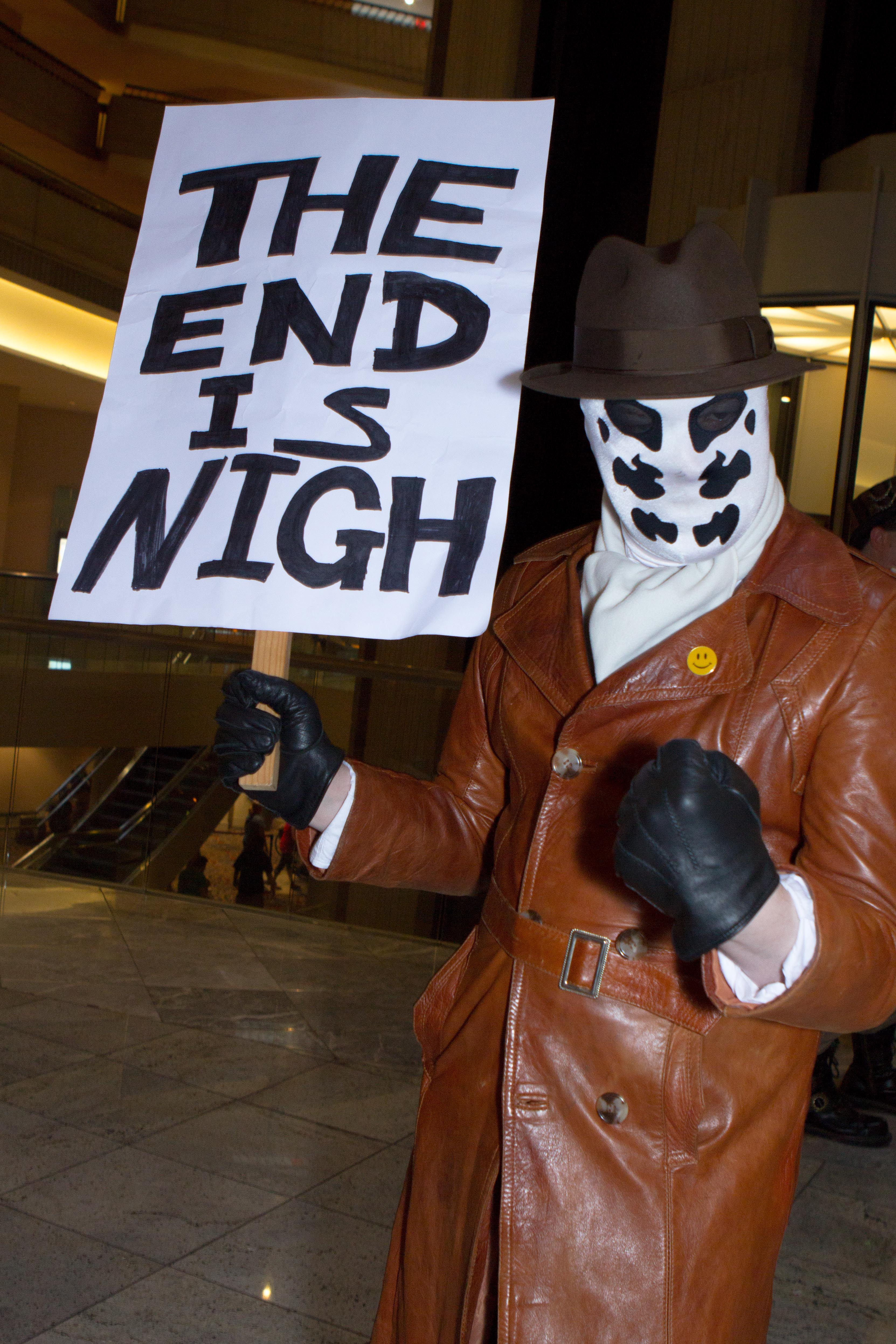 Cosplay at Dragon*Con 2013.